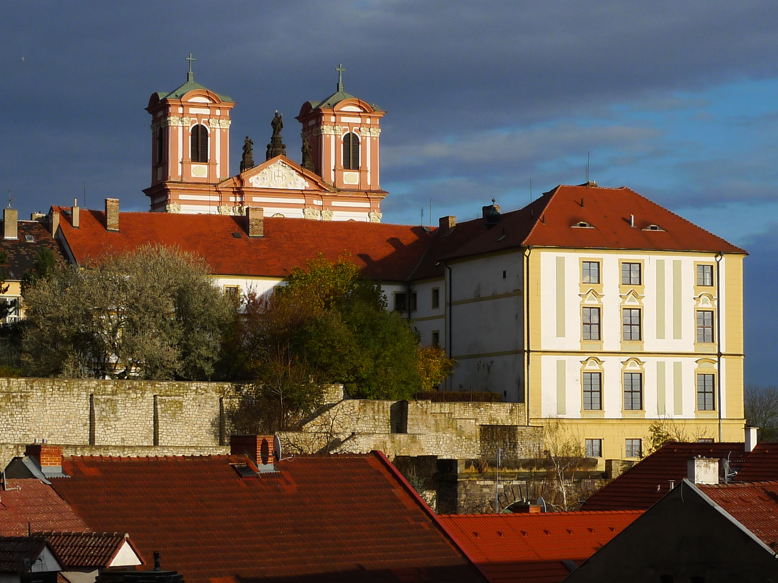 Kostel jezuitský, Zvěstování P. Marie (Litoměřice), Jezuitská 1/20, Litoměřice